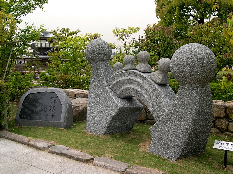 Teruteru1477s.jpg